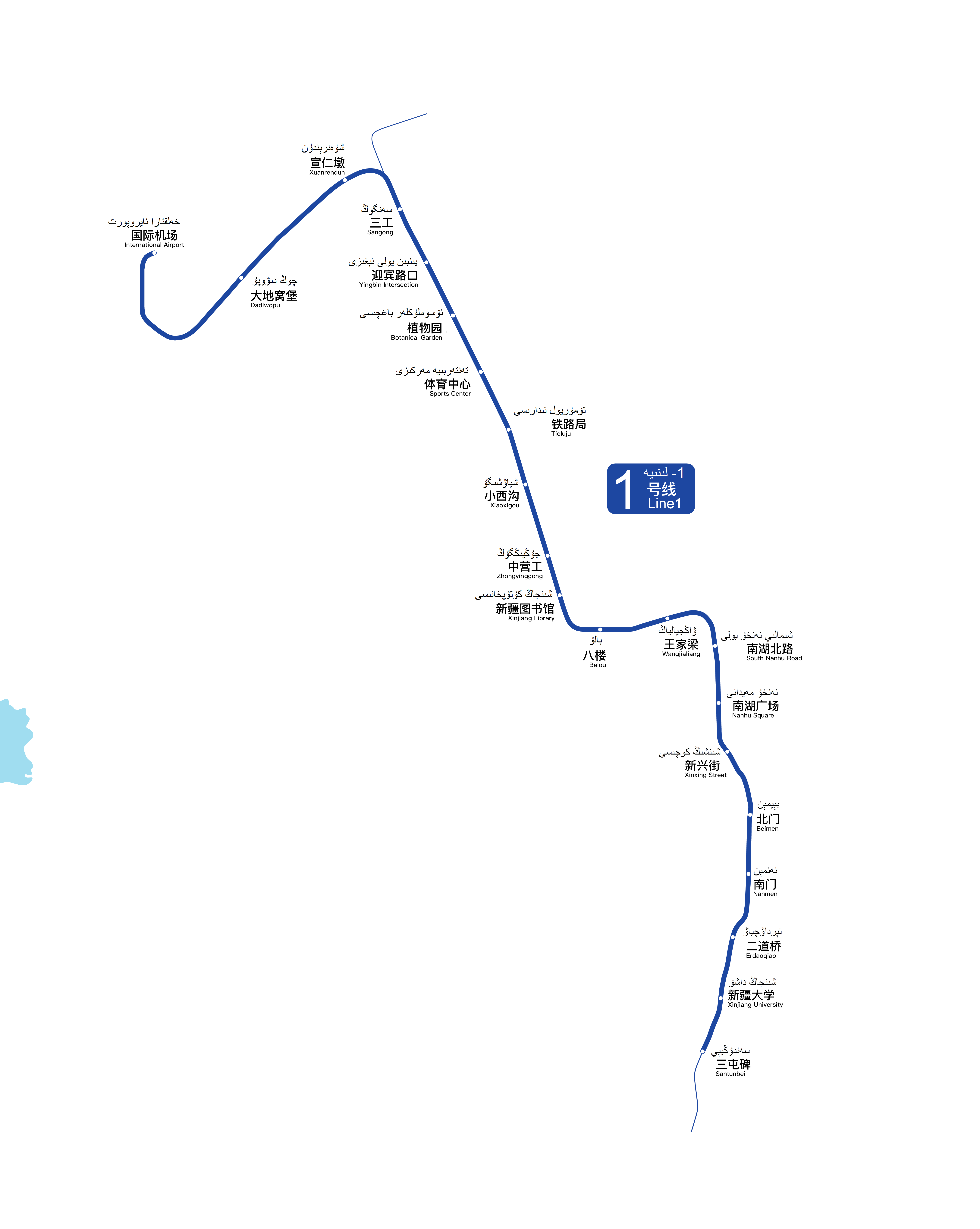 中文（中国大陆）: 乌鲁木齐地铁1号线线路图